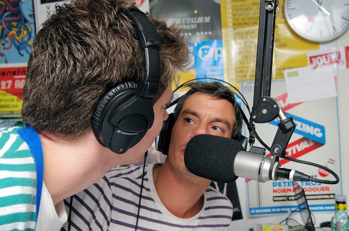 Haarlem 105 radio dj's Wessel van Opstal en Remco Rhee tijdens Wereldrecord in de categorie "Muziekprogramma op de radio in teampresentatie.